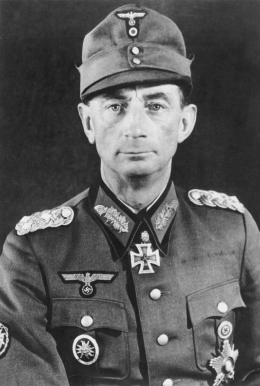 Neueste Aufnahme von Generaloberst Dietl. PK-Aufnahme: Kriegsberichter Bauriedl -PBZ herausg. 22.4.1943